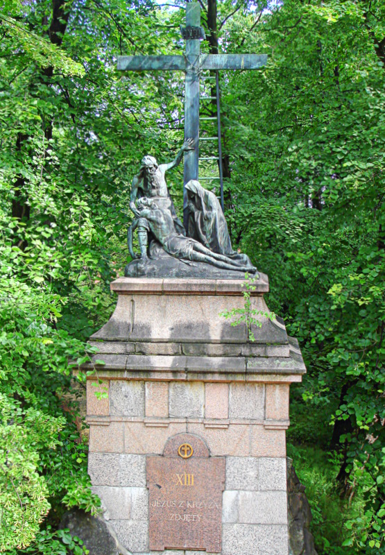 Zespół klasztorny oo. Paulinów: Kościół pw. Wniebowzięcia NMP i Znalezienia Krzyża Św. z kaplicami, zakrystią, skarbcem, wieżą, klasztorem, zabudowaniami gospodarczymi, arsenałem, drukarnią, domem muzykantów, twierdzą z bramami i bastionami, park Częstochowa, Częstochowa 02.1978.